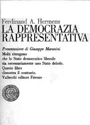 Ferdinand A. Hermens Werk “Demokratie oder Anarchie” wurde in zahlreiche Sprachen übersetzt.